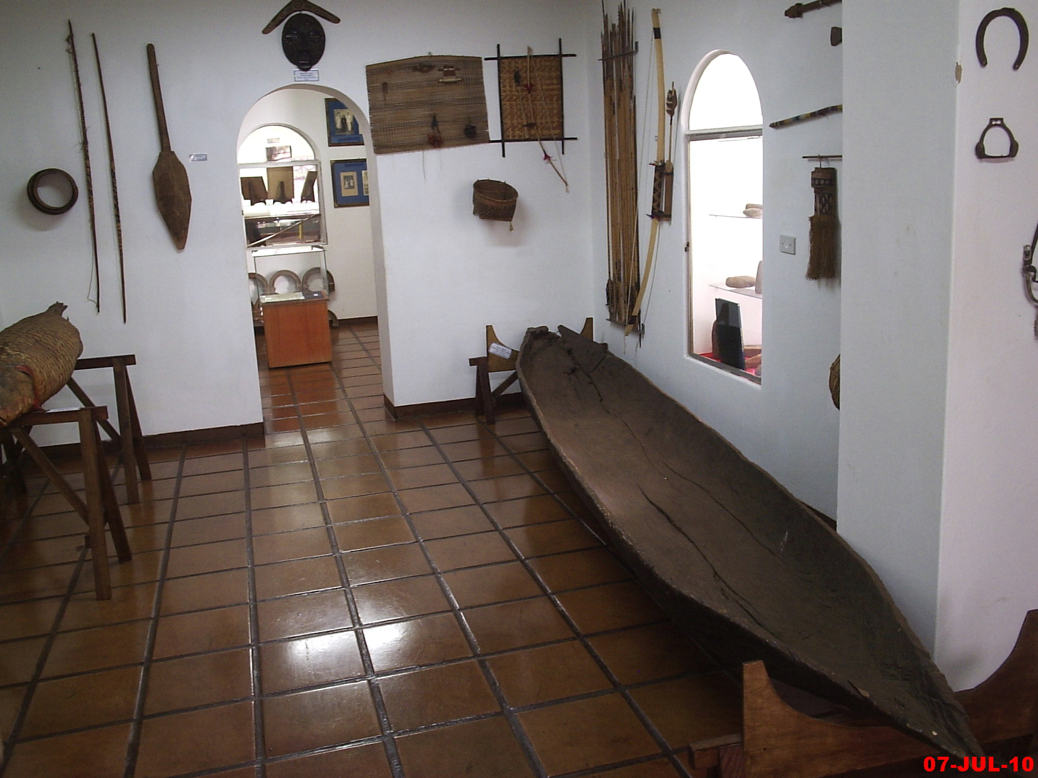 Parte indígena, com destaque para a Piroga(canoa indígena) - Museu Histórico de Jaboticabal